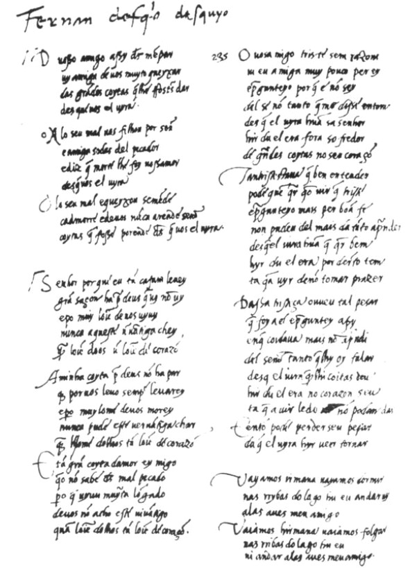 Cantigas de Esquio no Cancioneiro da Vaticana